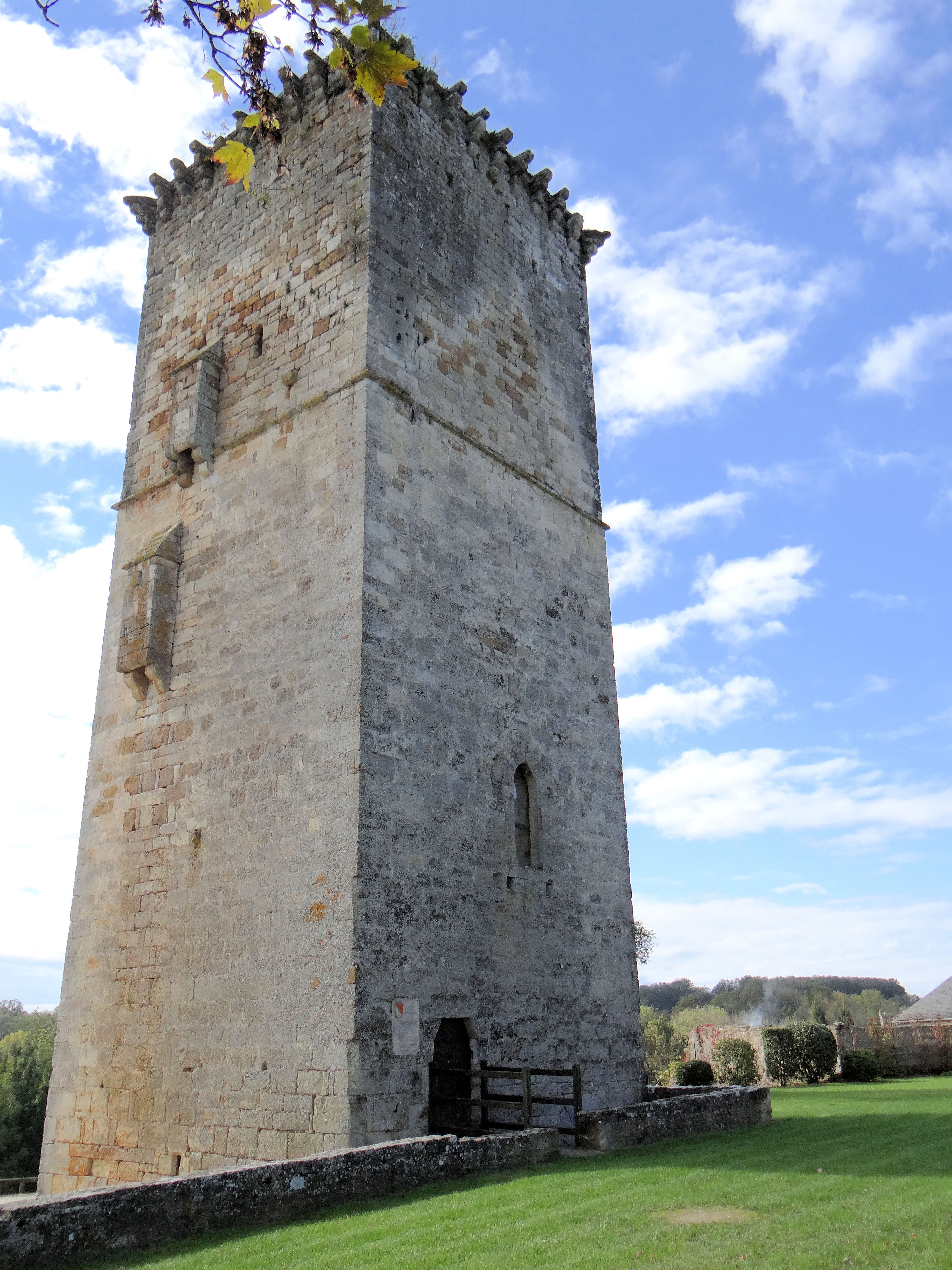 Tour de Chavagnac